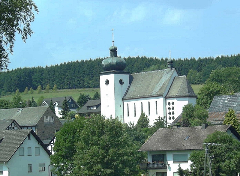 Bracht Kirche (Schmallenberg), Germany.